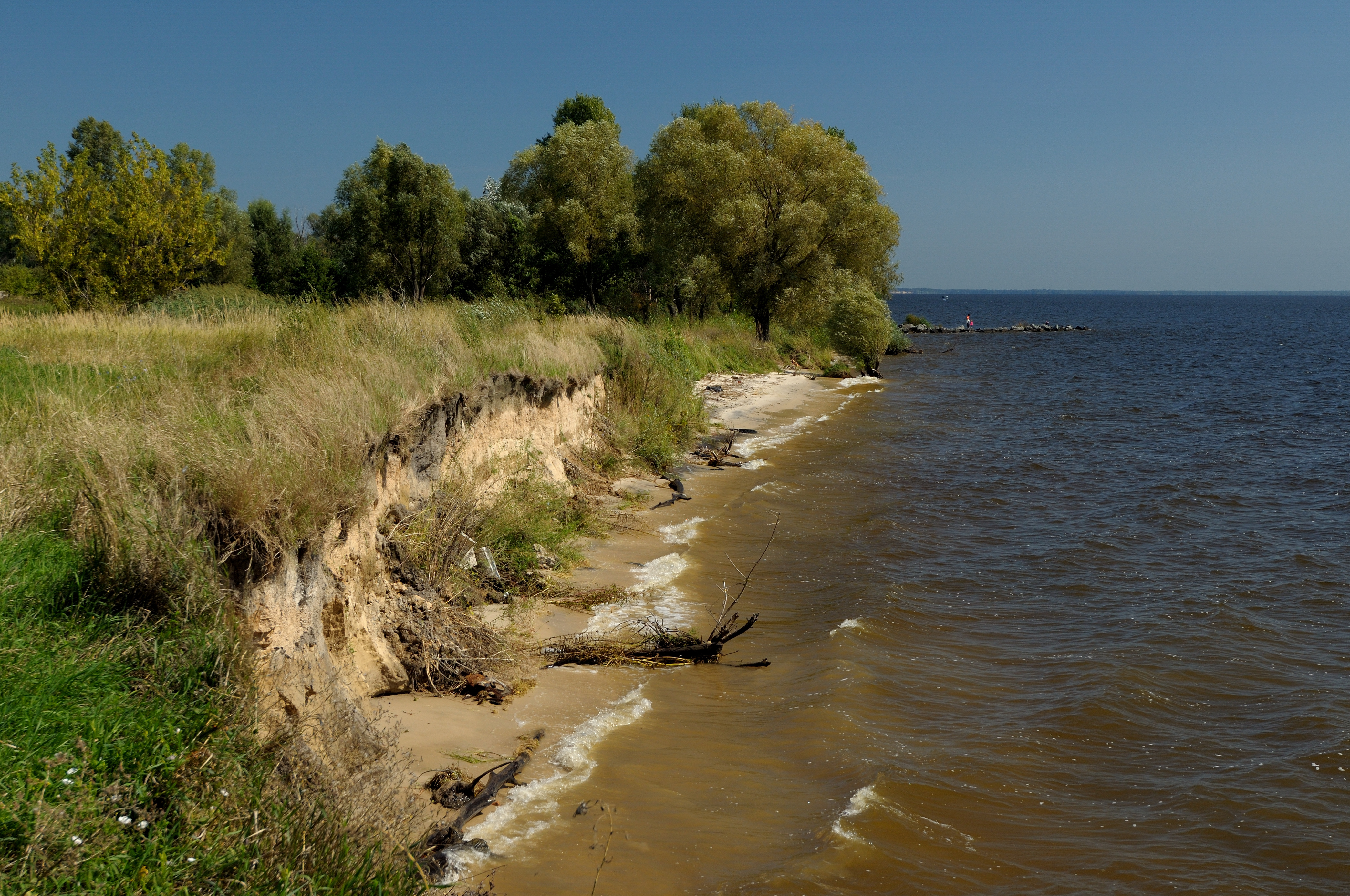 Узбережжя Київського моря у села Ясногородка: Узбережжя Київського моря у села Ясногородка